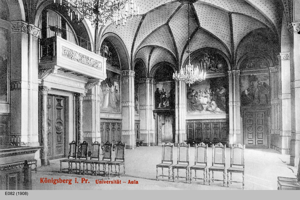 Aula der Albertina in Königsberg